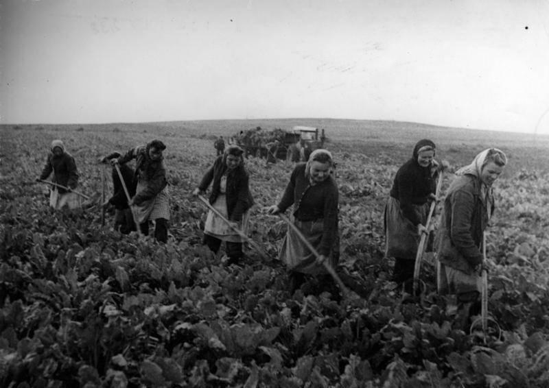 Sachsen-Anhalt, Ernte von Zuckerrüben Illus / Panorama-Foto 1.11.48/ Zuckerrüberernte in der Magdeburger Börde Vor dem Ausheben der Rüben werden diese geköpft d. h. das Blätterwerk wird entfernt. [Frauen entfernen die Rübenblätter]